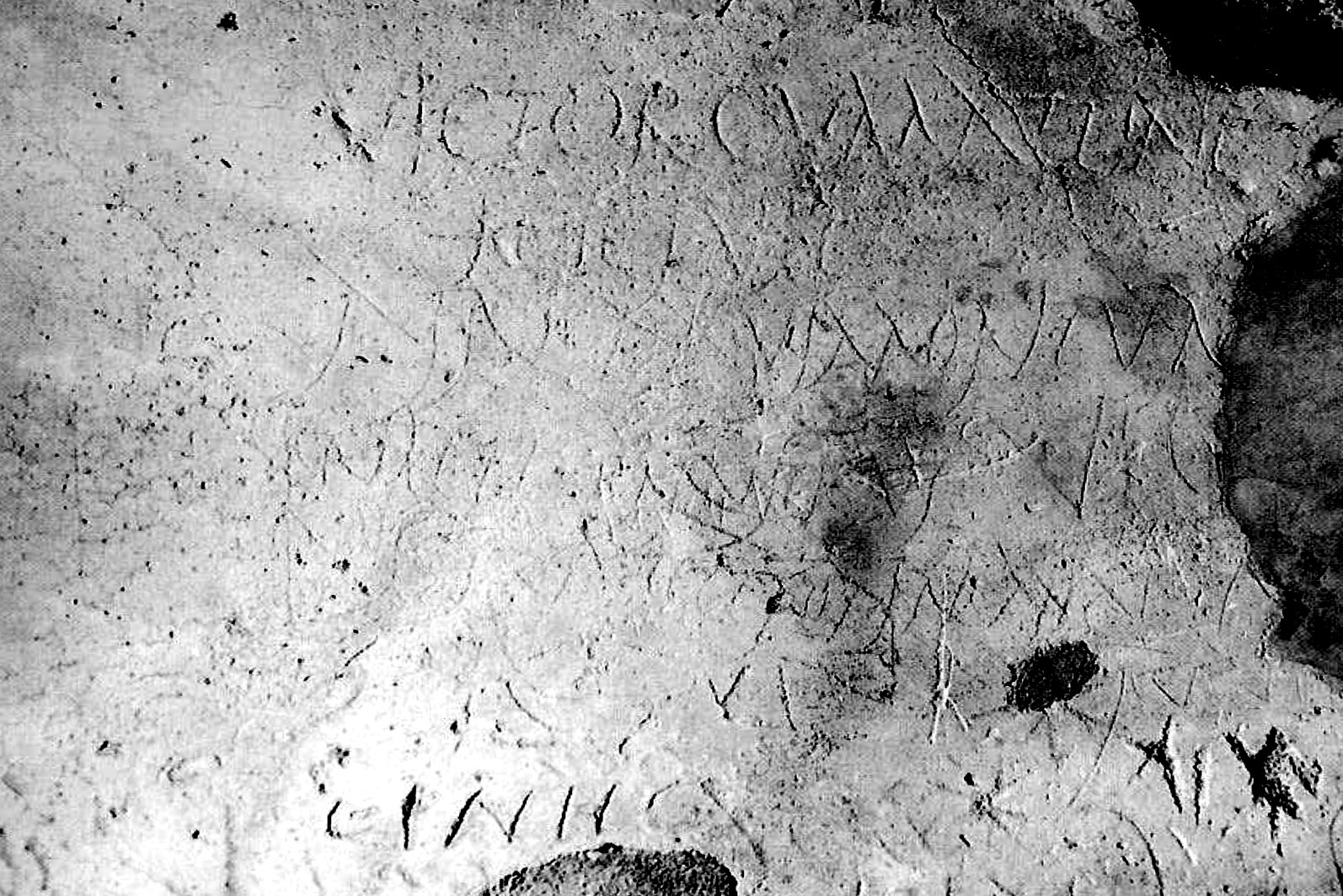 Inscripción erótica en un lupanar de Pompeya